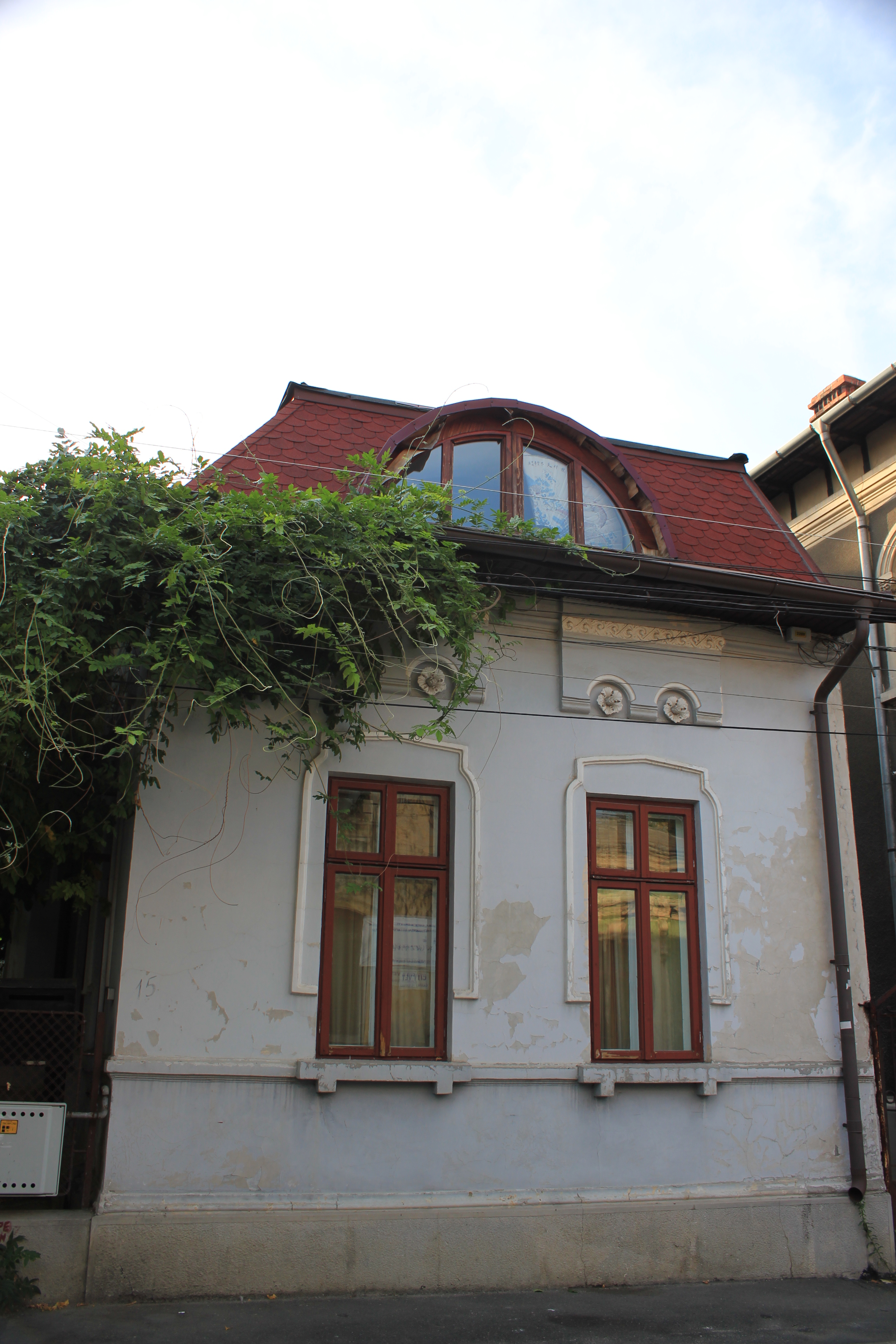 Casă Kiritescu Constantin 15